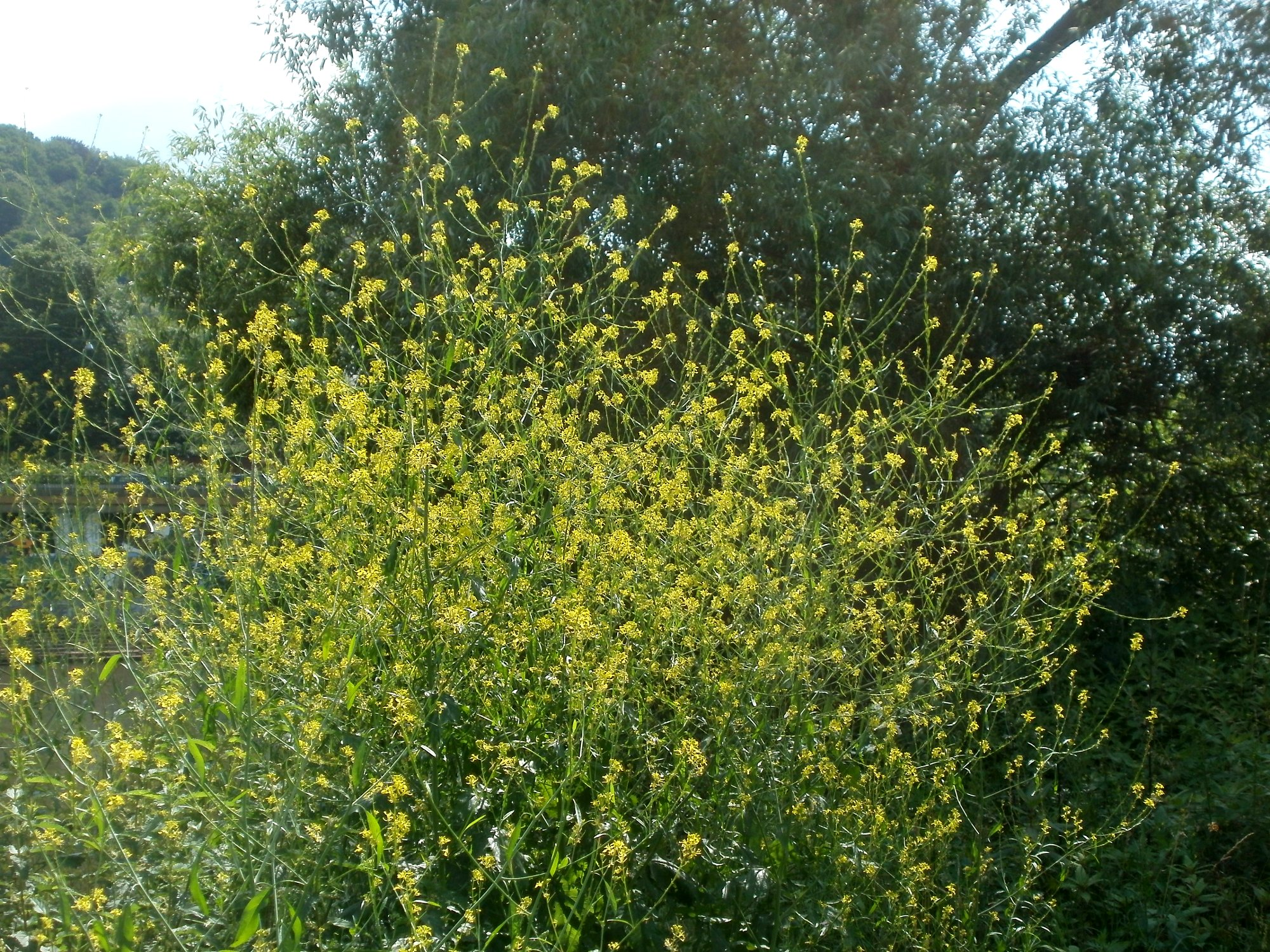 Schwarzer Senf (Brassica nigra) an der Saar in Saarbrücken